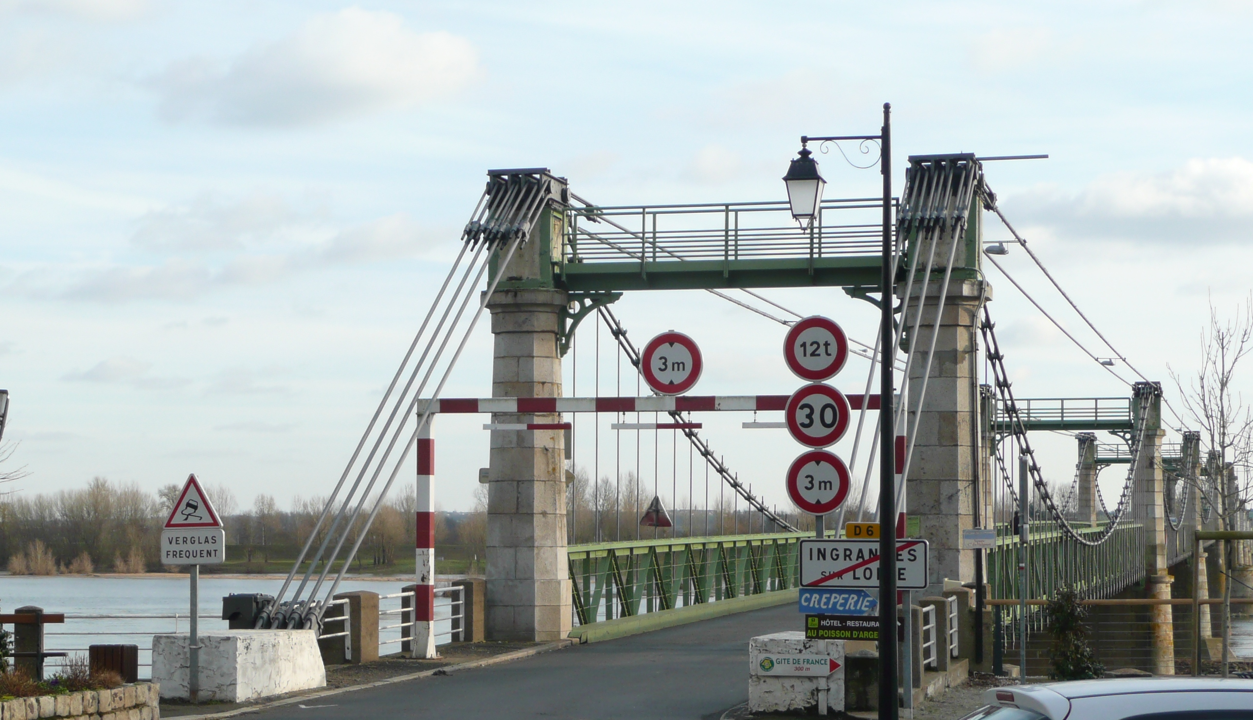 Vue depuis Ingrandes-sur-Loire